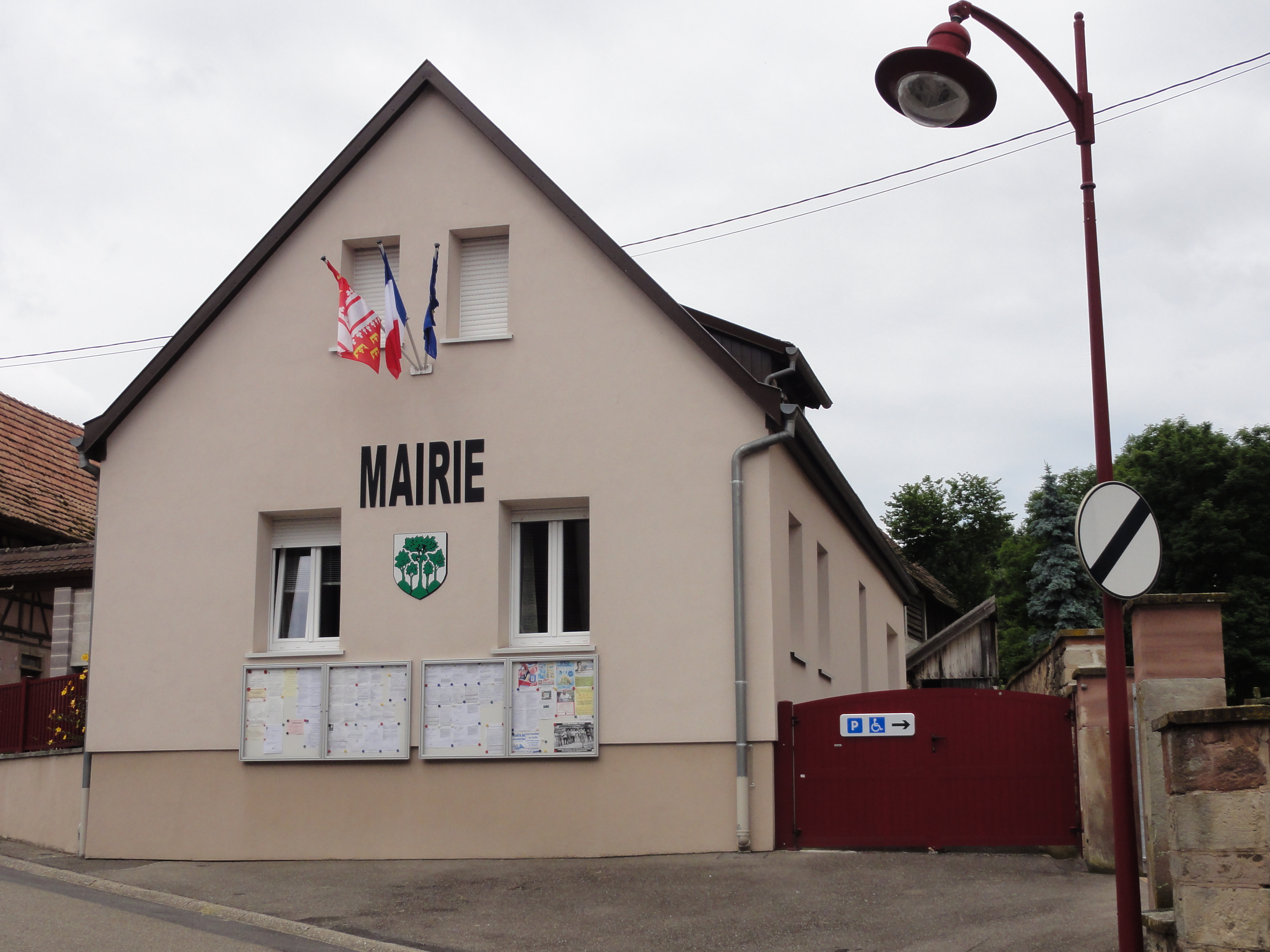 Alsace, Bas-Rhin, Waltenheim-sur-Zorn, Mairie.